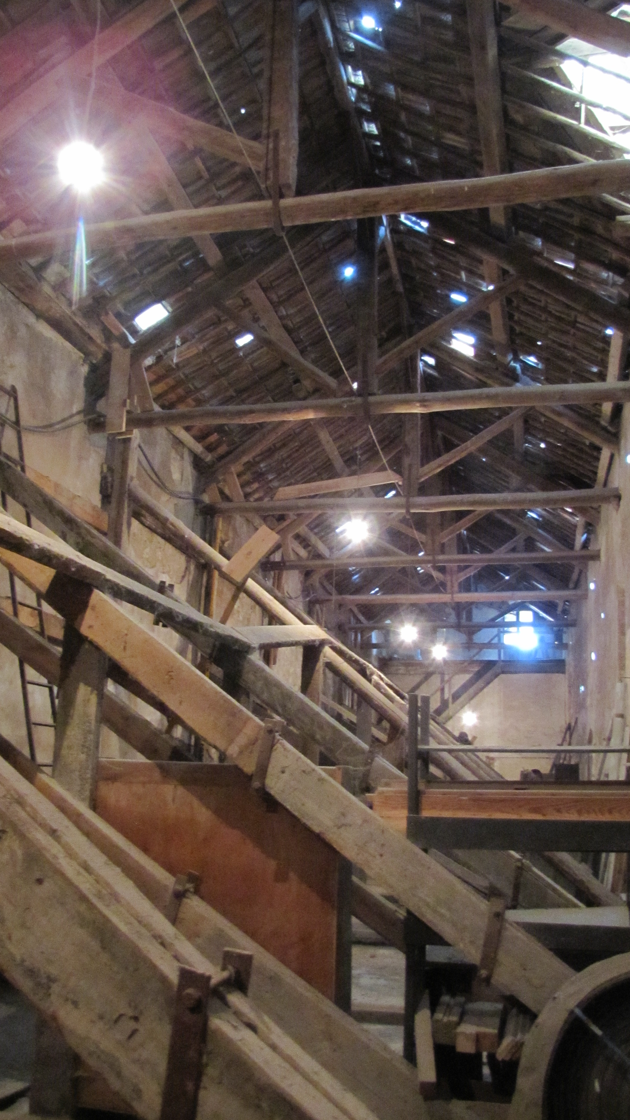 Apuntalamiento, de principios del siglo XX, completamente hecho en maderada. Forma parte de las antiguas instalaciones fabriles del Grupo Mirat en Salamanca.